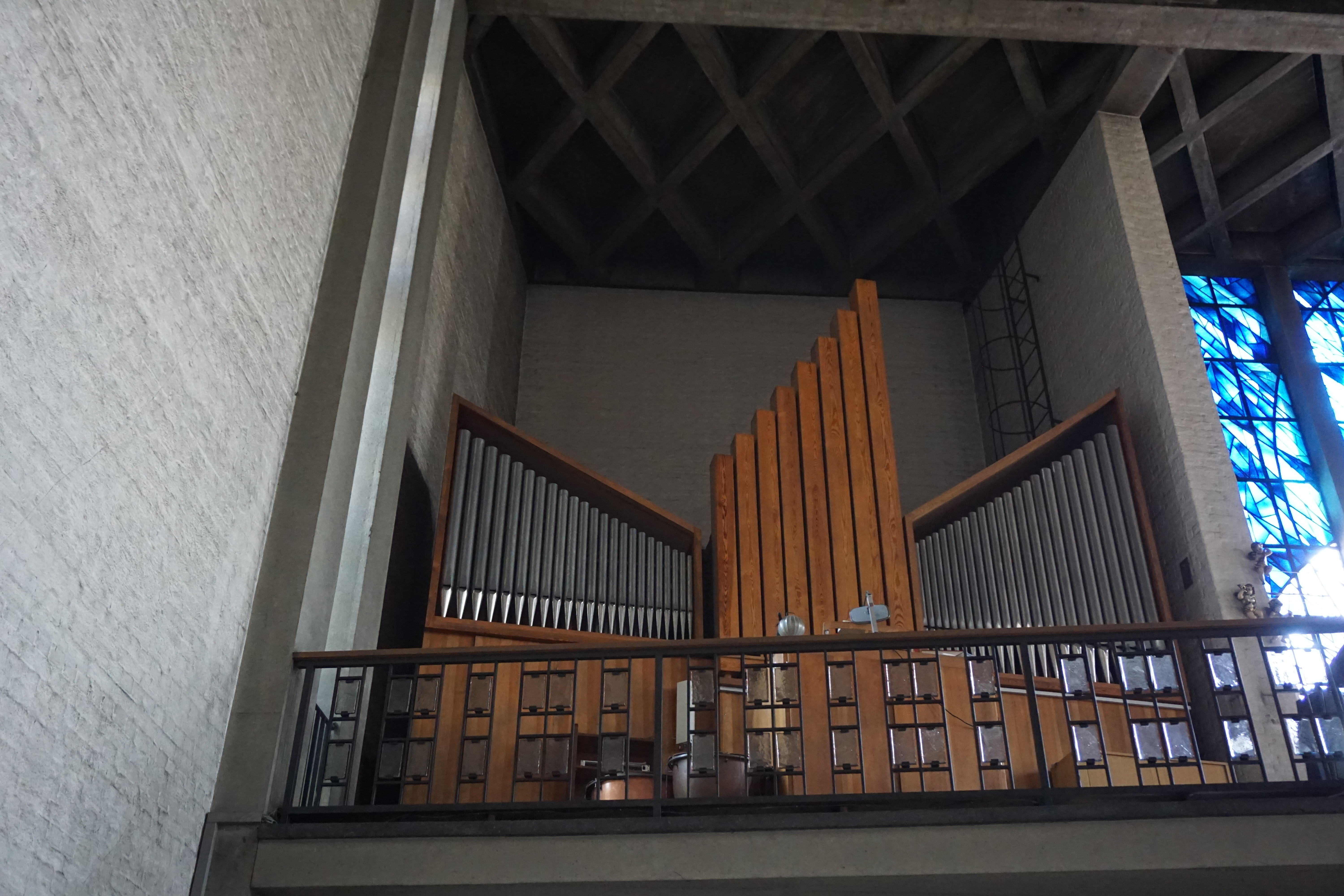 St. Thomas Morus ist ein modernes Kirchengebäude im Münchner Stadtteil Sendling-Westpark. Es ist als Baudenkmal in die Denkmalliste eingetragen.